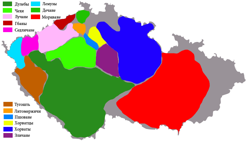 Карта чешских племён в рамках современного государства Чехия. Карта основана на информации из книги Седов В. В. Славяне: Историко-археологическое исследование. — М., 2002. — С. 448.